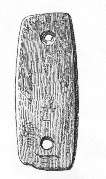 Armschutzplatte aus einem Dolmen bei Gard (Grailhe)